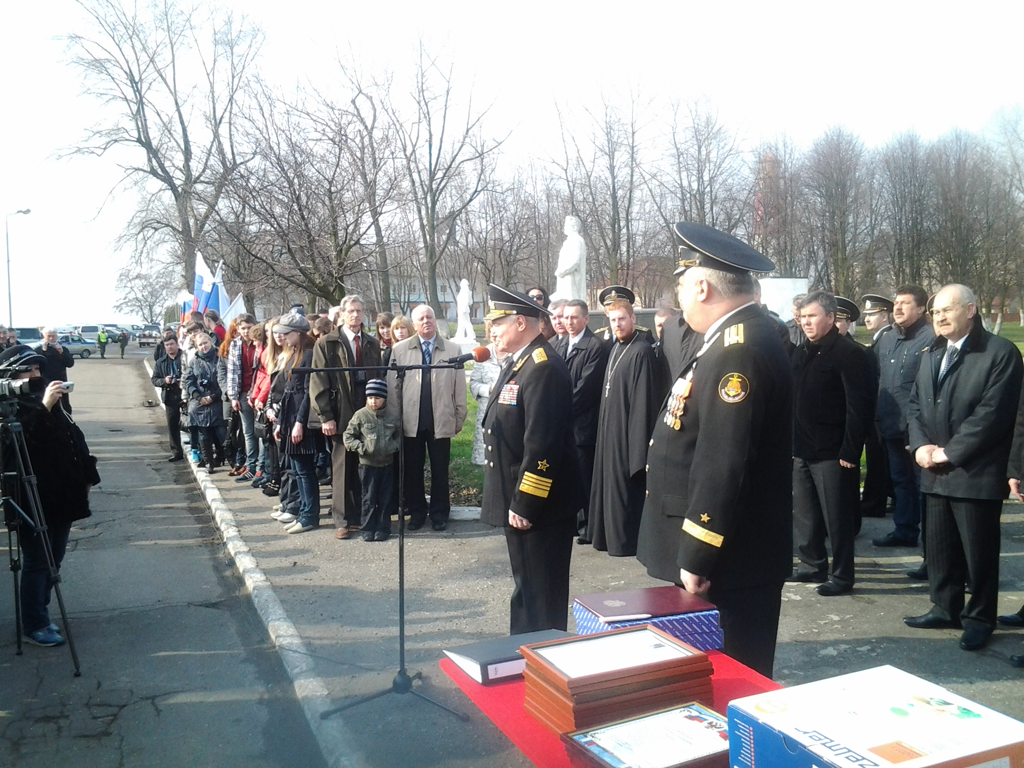 Почётный командующий Балтийским флотом адмирал флота Егоров говорит речь, г. Балтийск (апрель 2012 г.)